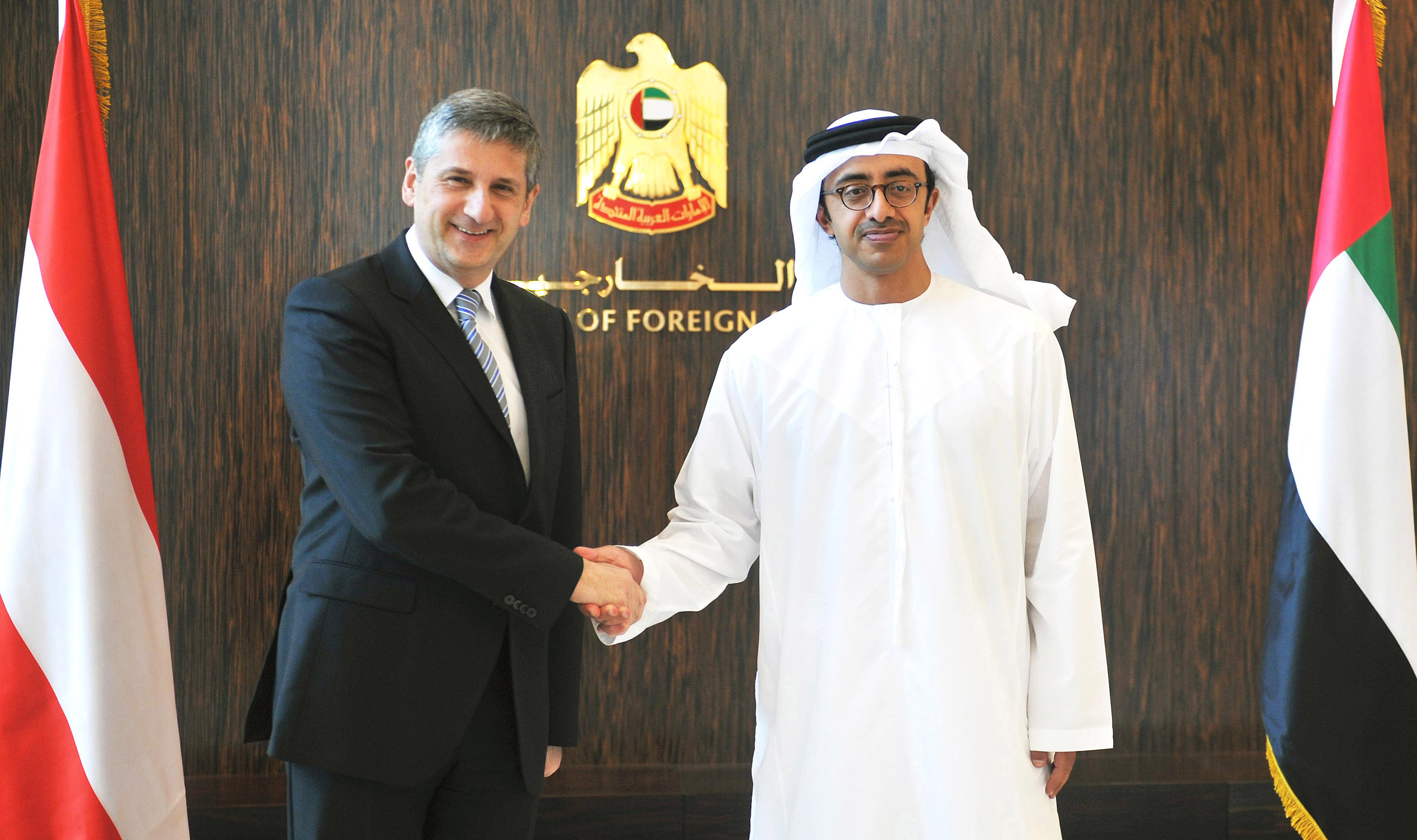 Arbeitsbesuch Vereinigte Arabische Emirate. Vizekanzler Michael Spindelegger trifft Minister Sheikh Abdullah bin Zayed Al Nahyan. Aussenministerium, Abu Dhabi, 13.02.2013, Foto: Tatic/MOFA UAE